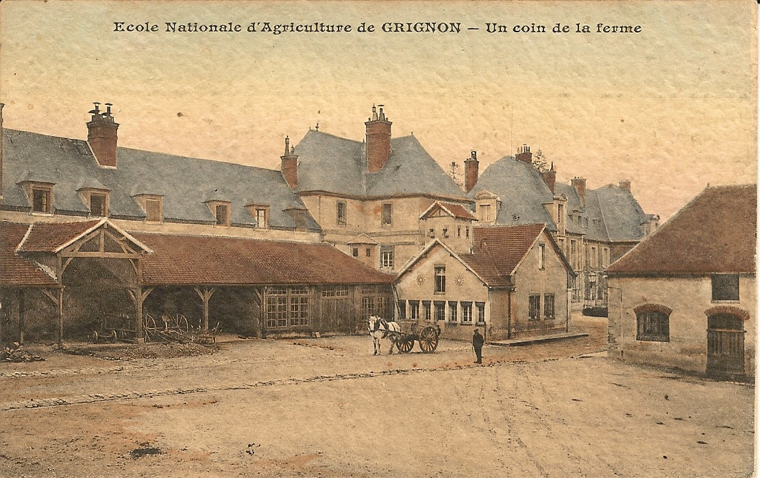 Cour de la ferme intérieure de l'école d'agriculture de Grignon (Yvelines, France) au début du XXe siècle